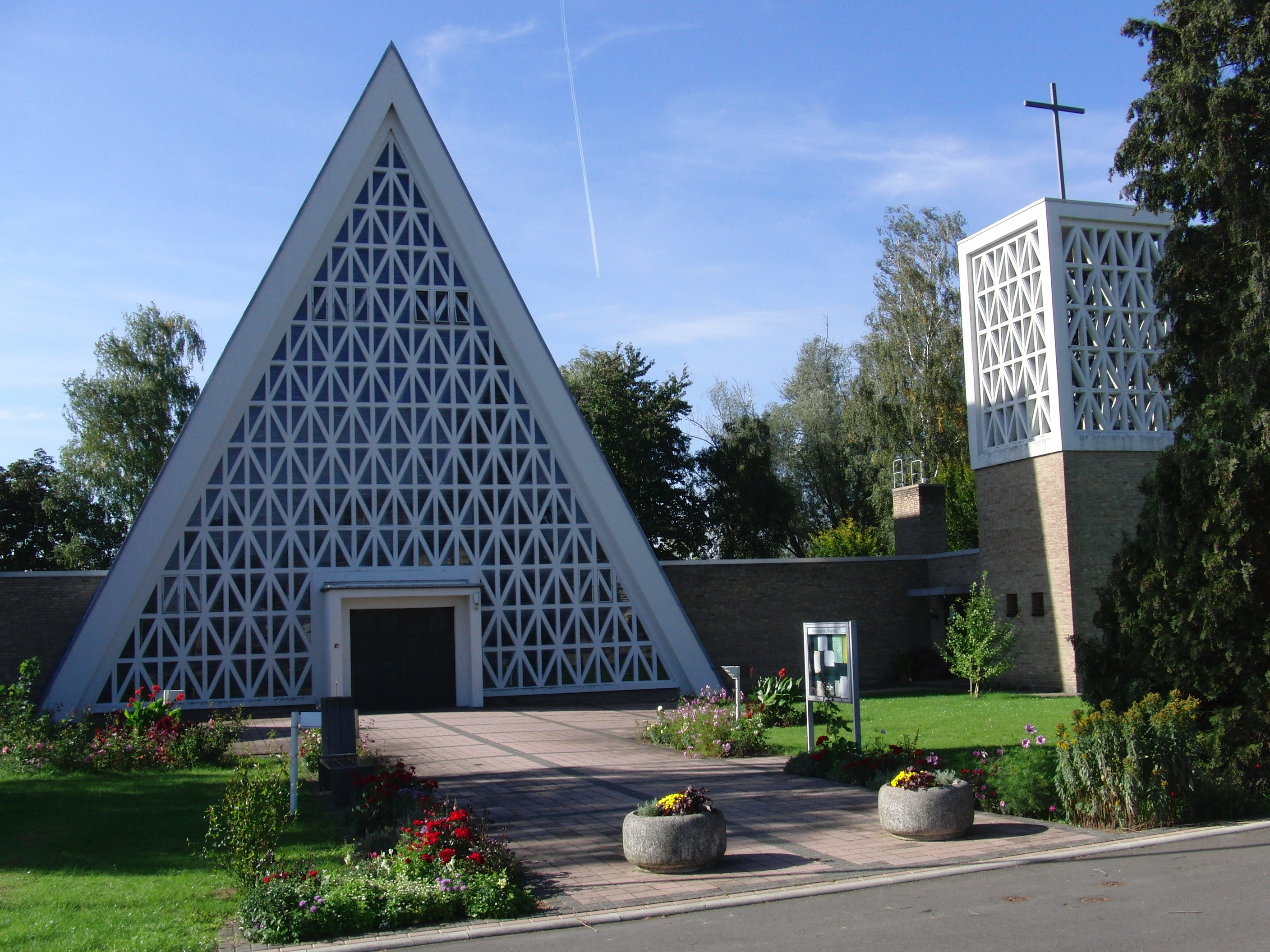 Wallfahrtskirche Maria-Hilf in Trutzhain, Hessen (Deutschland)